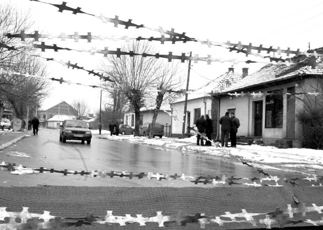 Косово и Метохија: Срби и неалбанци у Липљану живе као у гету, штите их барикаде од бодљикаве жице. Фото:Дарко Дозет